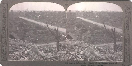 La Bassée, Franciaország. A település romjai, miután a német birodalmi hadsereg egységei kiürítették a helységet. A kép korabeli sztereófelvétel